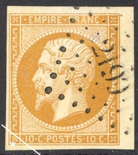 France stamp Empire Napoleon III (1853-1854)